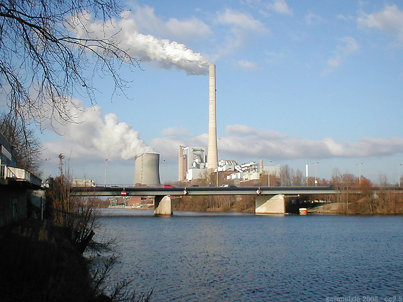 Neckarbrücke bei Heilbronn-Neckargartach, im Hintergrund das Kraftwerk Heilbronn